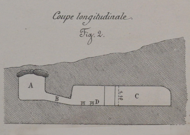 une lithographie présentant les fouilles.